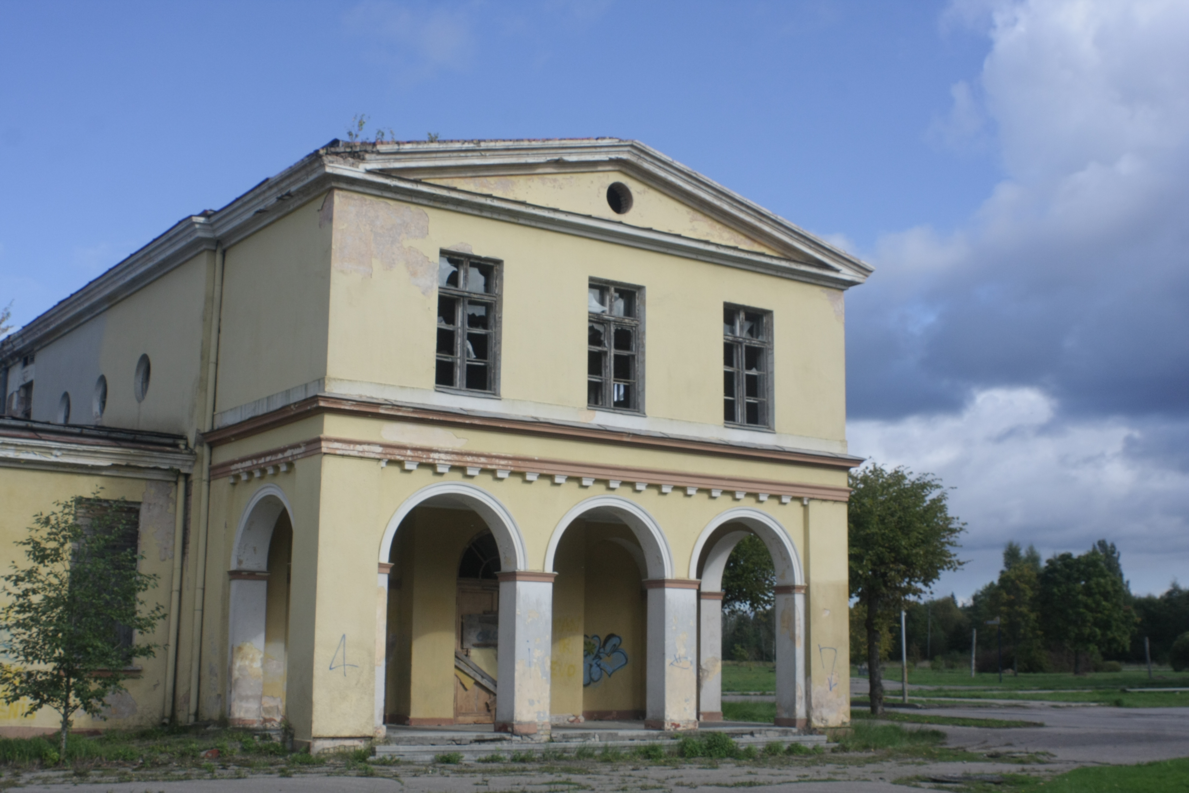 Peldu iestāde, Jūrmala, Emīla Dārziņa iela 28